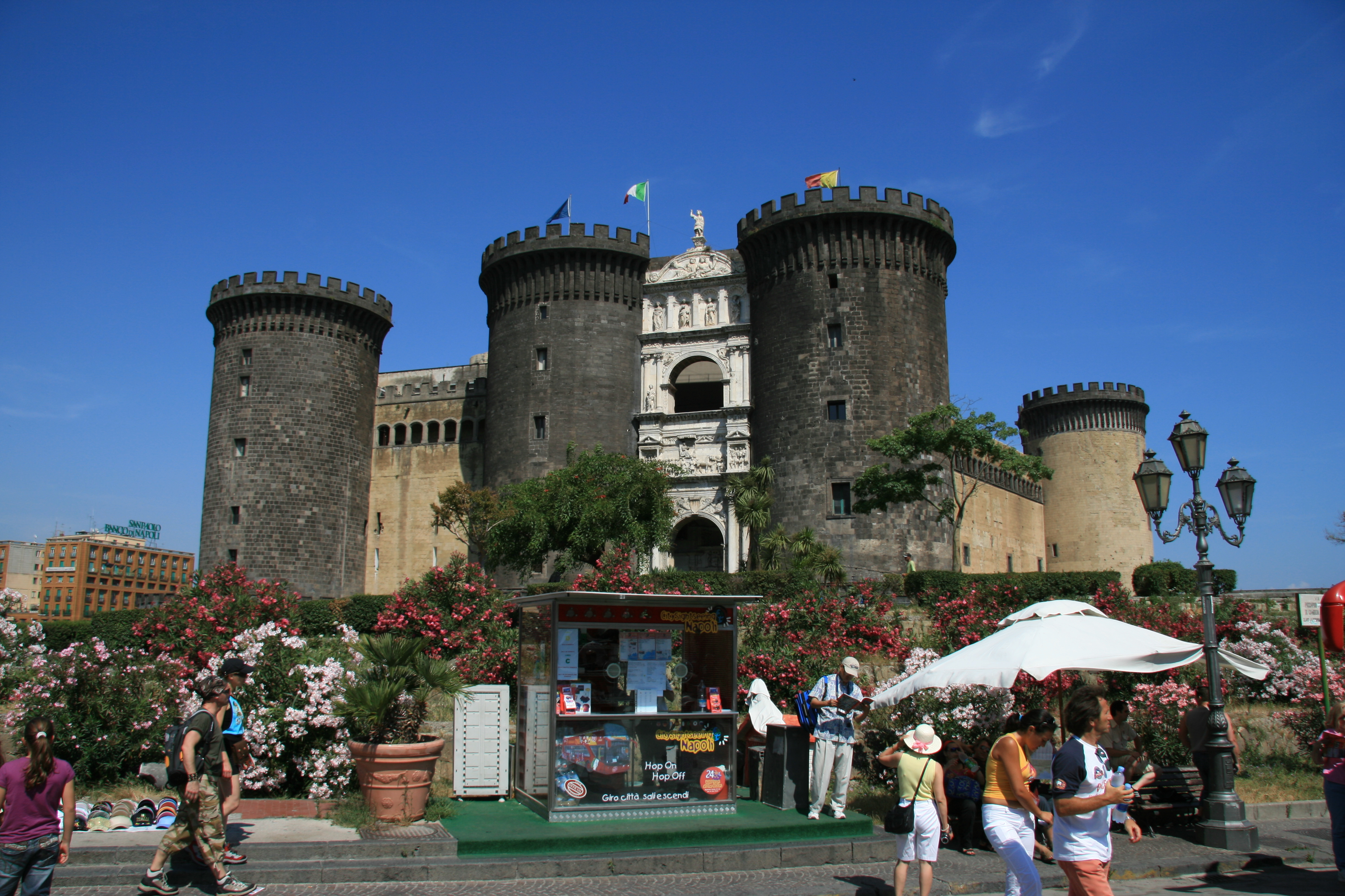 Maschio Angioino